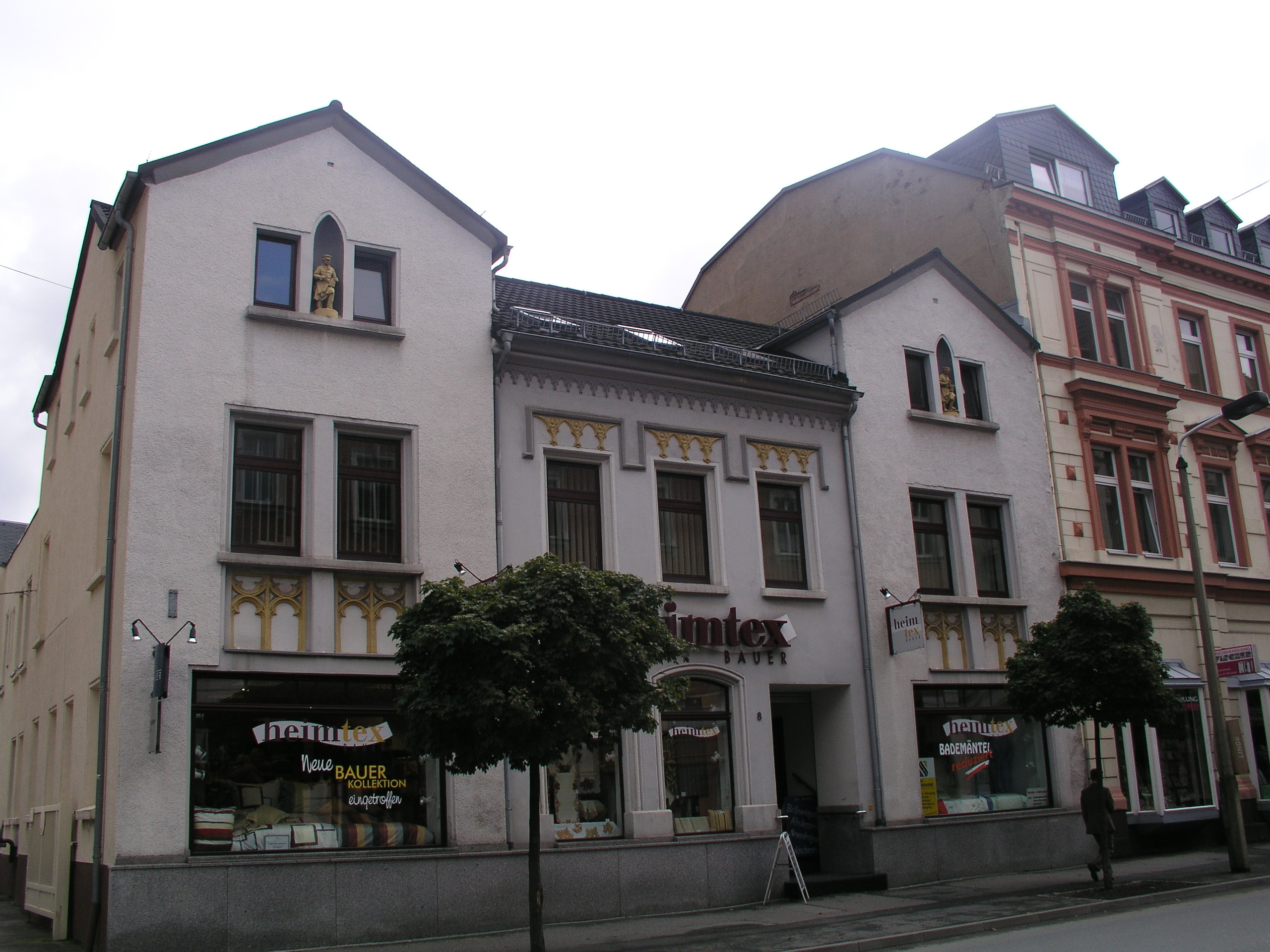 Heimtexladen der Firma „Curt Bauer“ in der Bahnhofstraße